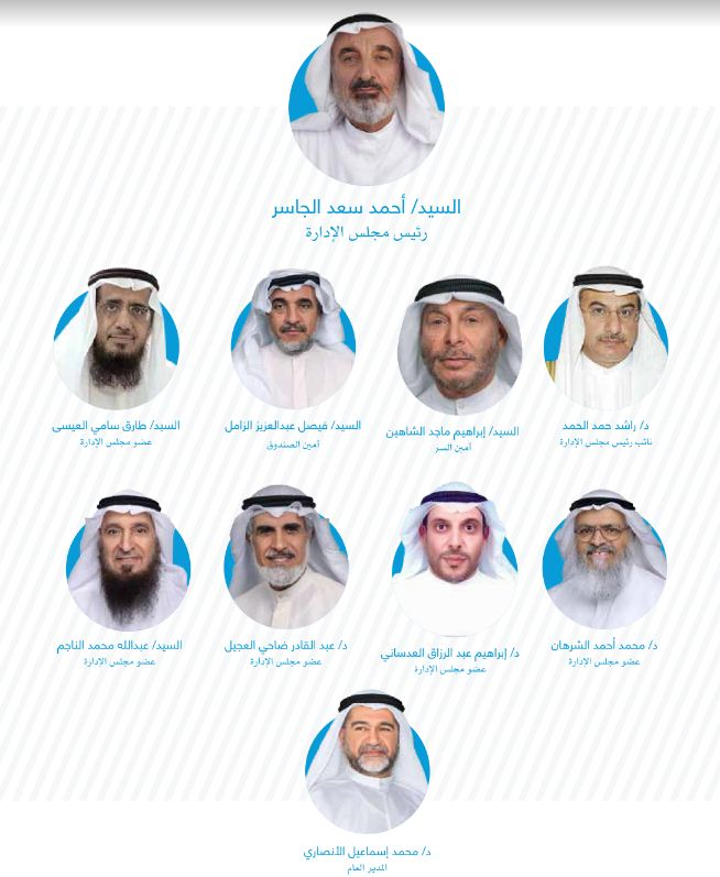 مجلس ادارة الجمعية